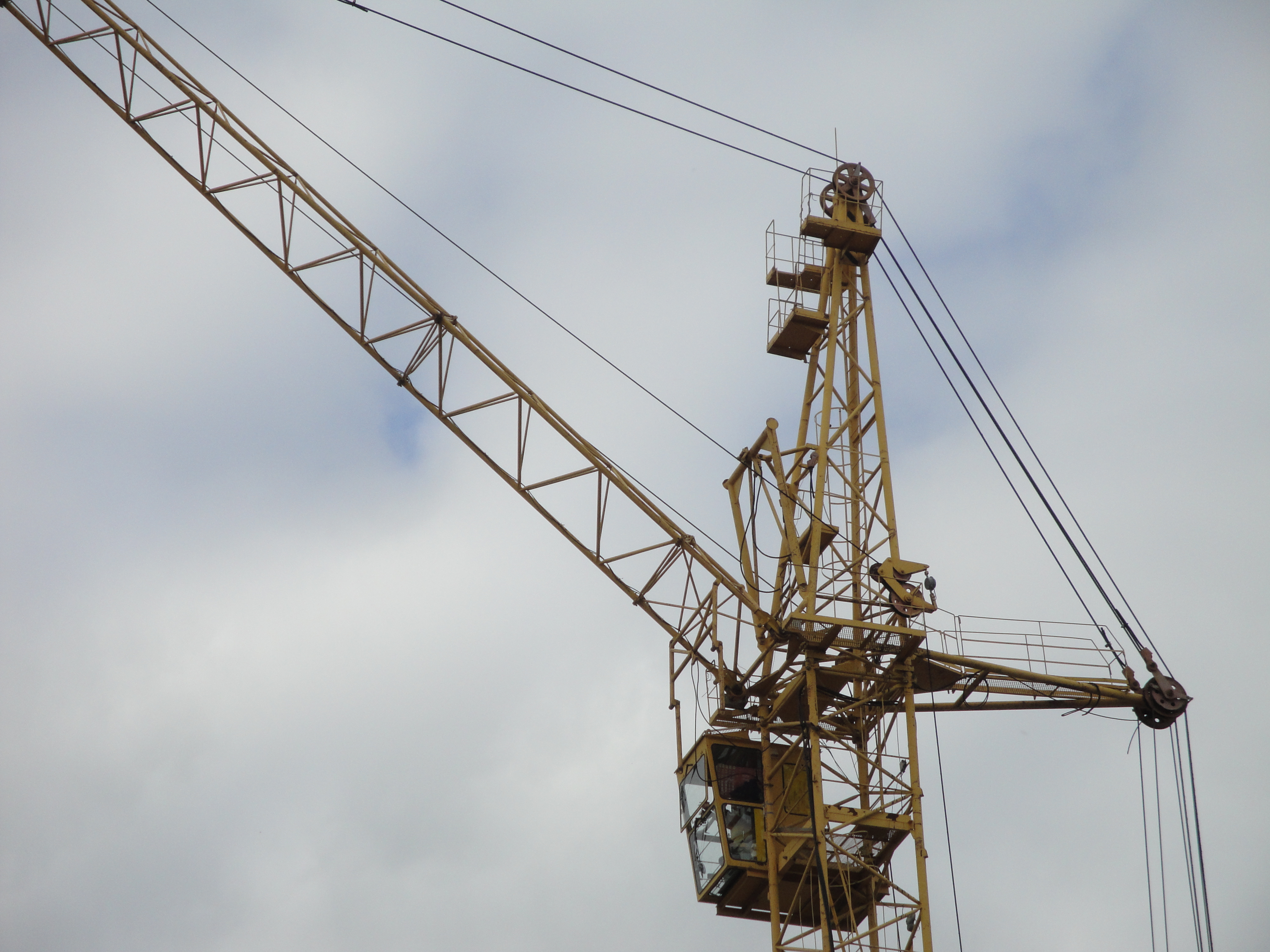 Кран КБМ-401 на строительстве жилого дома Забалуева